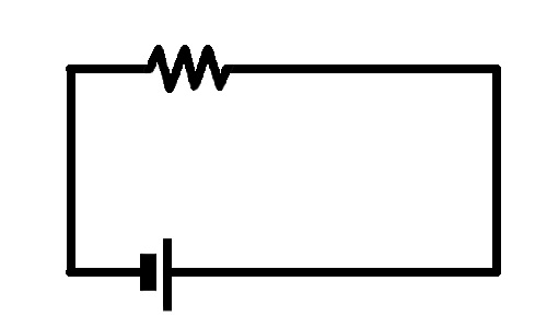 직류회로도